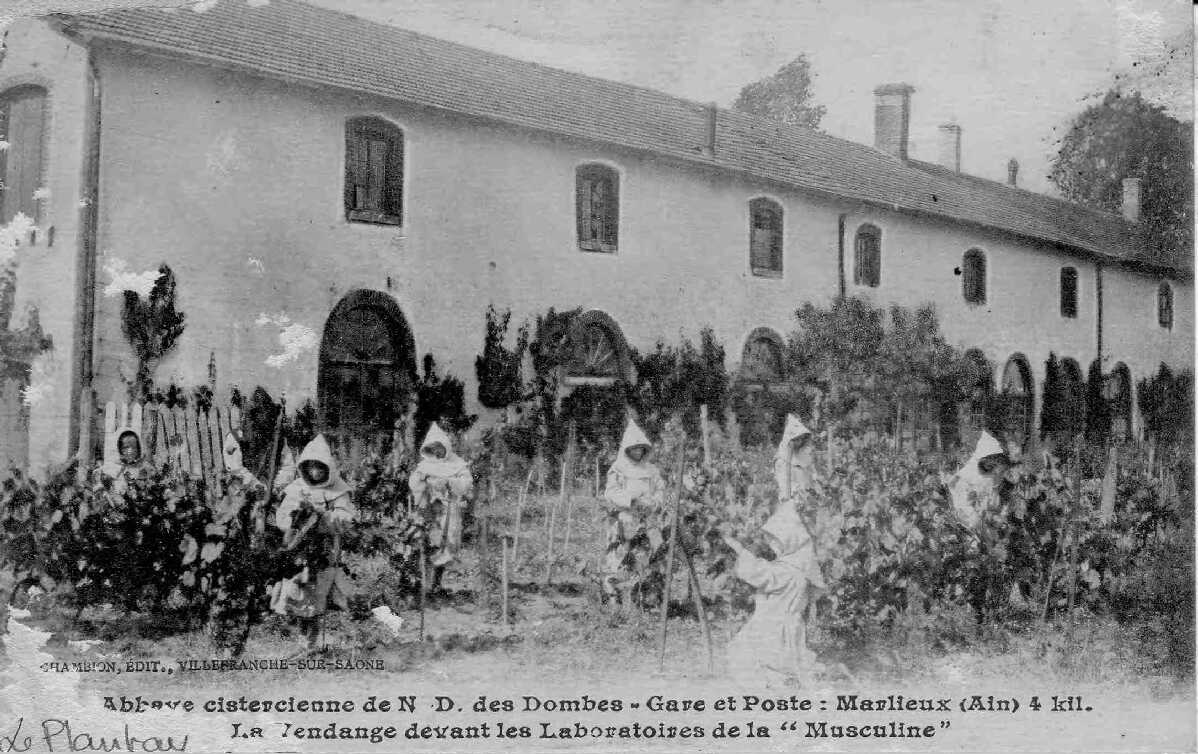 Carte postale ancienne - Notre-Dame-des-Dombes - la vendange devant les laboratoires de la Musculine.